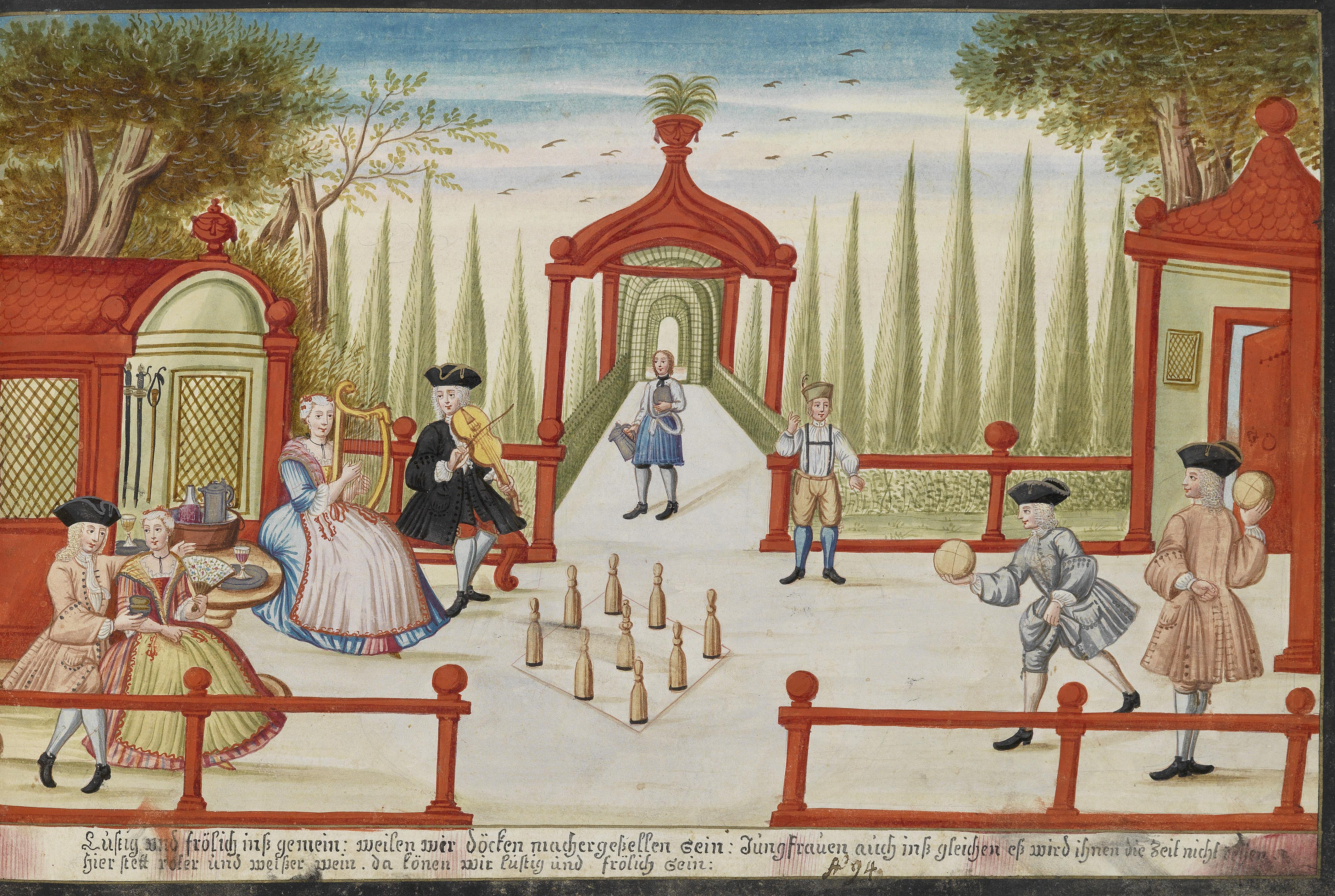 Lustig und frölich inß gemein: weilen wir döcken machergesellen sein: Jungfrauen auch inß gleichen: es wird ihnen die Zeit nicht [...?]: hier stett roter und weißer wein. da können wir lustig und frölich sein (Musizieren und Kegelspiel in barockem Garten) selbst gefertigte Seite aus dem Musterbuch und Privatalbum des Wiener Deckenmacher-Gesellen Johann Franz Hörmannsperger, 1736